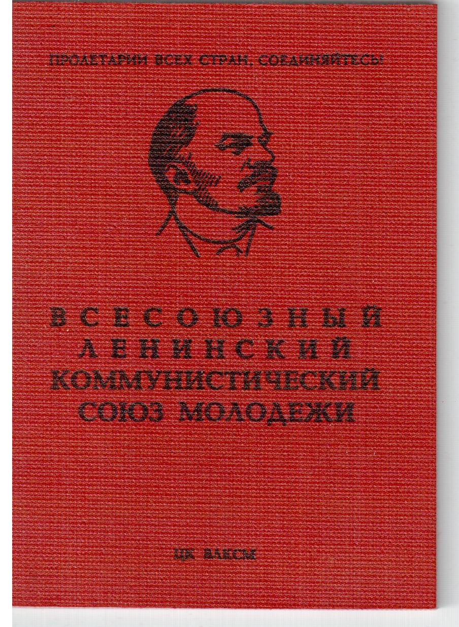 Обложка членского билета ВЛКСМ